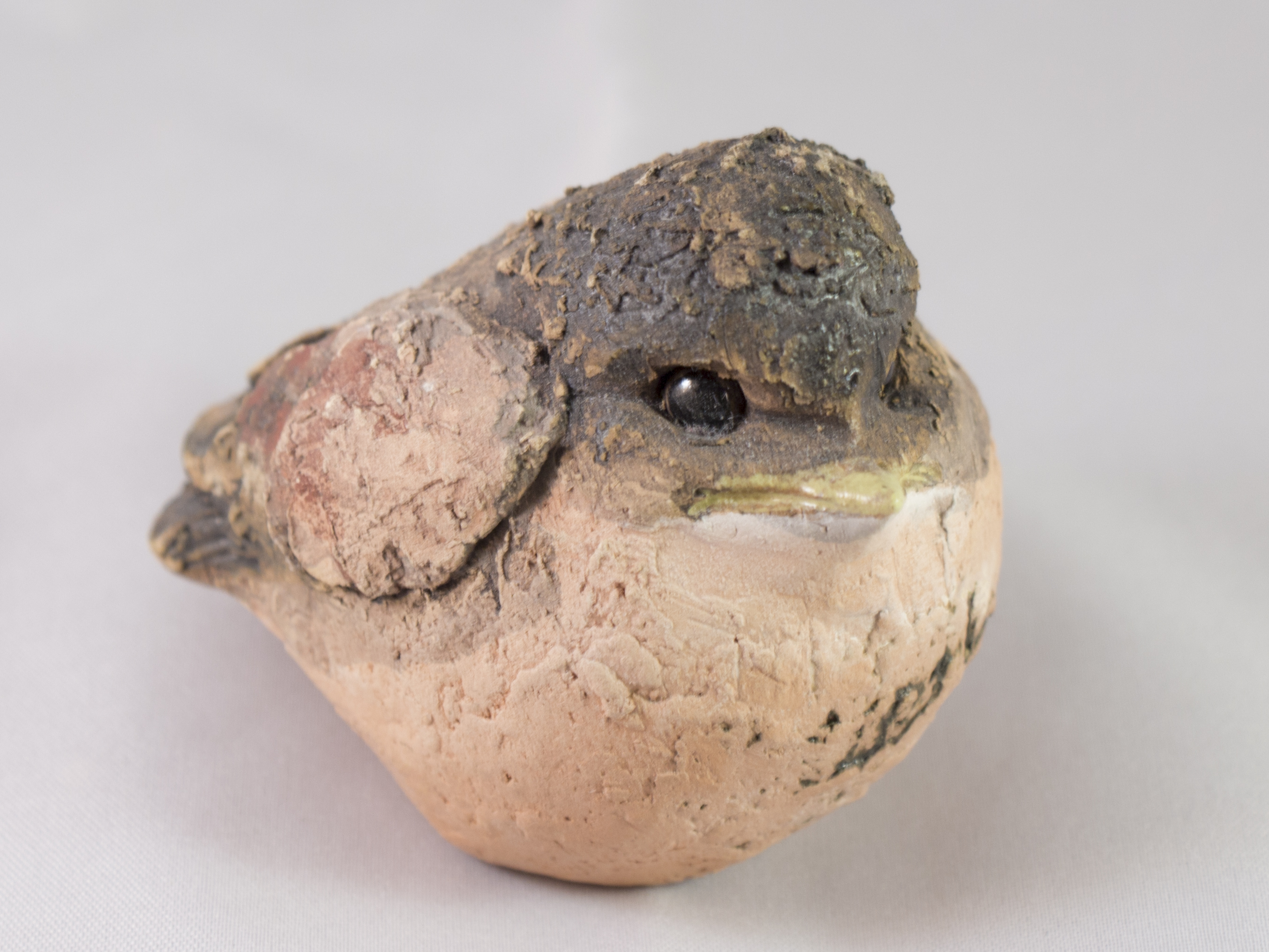 Kermamikfågel av keramikern Hannes Johannson